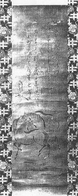 大御食神社の社宝 西行法師真筆